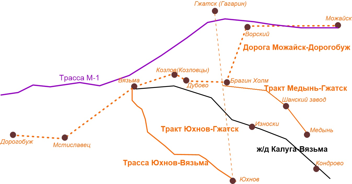 Современные и исторические дороги Юго-Запада: Тракт Юхнов-Гжатск, Тракт Медынь-Гжатск, Дорога Можайск-Дорогобуж